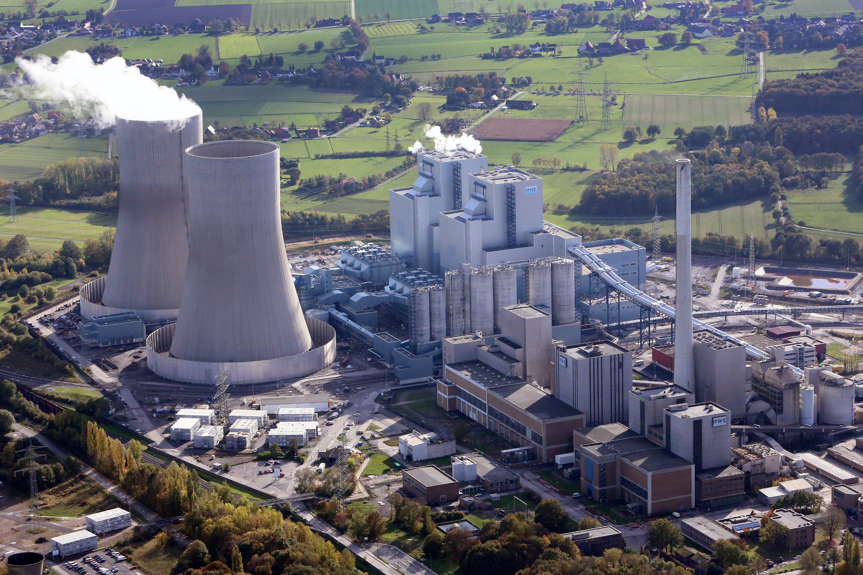 Luftbild Kraftwerk Westfalen RWE Hamm Uentrop 2013